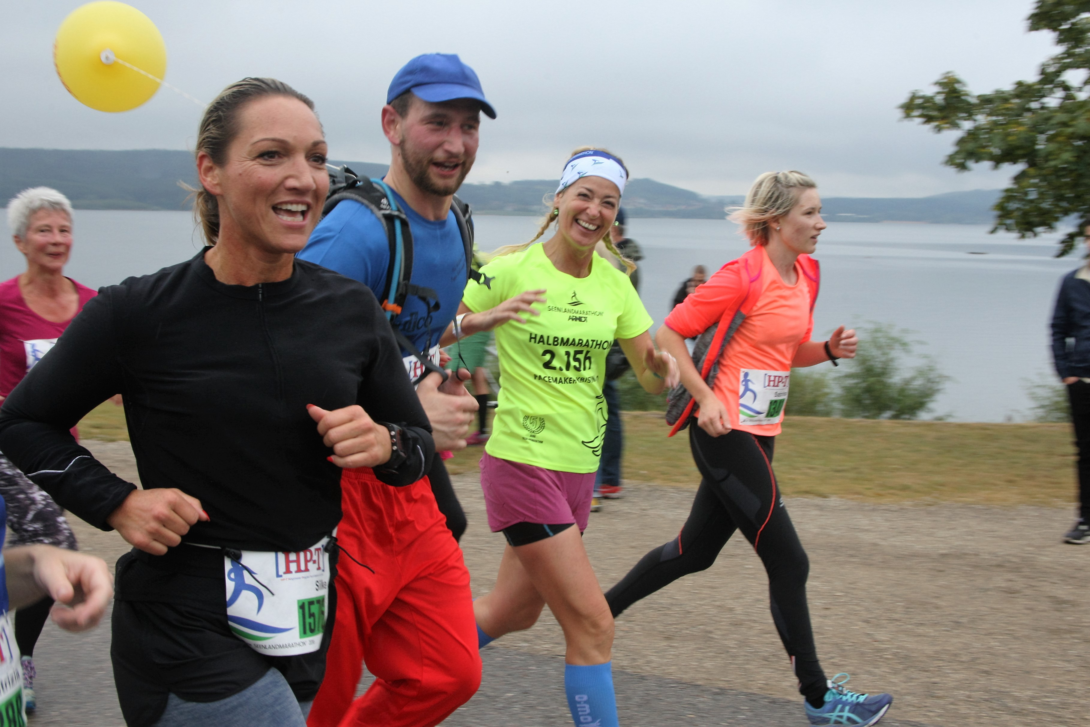 Die Strecke führt auf den Uferwegen um den Brombachsee.